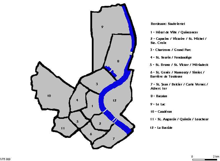 Stadtviertel von Bordeaux. Selbst erstellt von Benutzer:Bordeaux. GNU-Lizenz. Originalbild abgespeichert als jpg von Benutzer:Bordeaux. Nach png konvertiert von Benutzer:Phrood. Originalbild: 50px